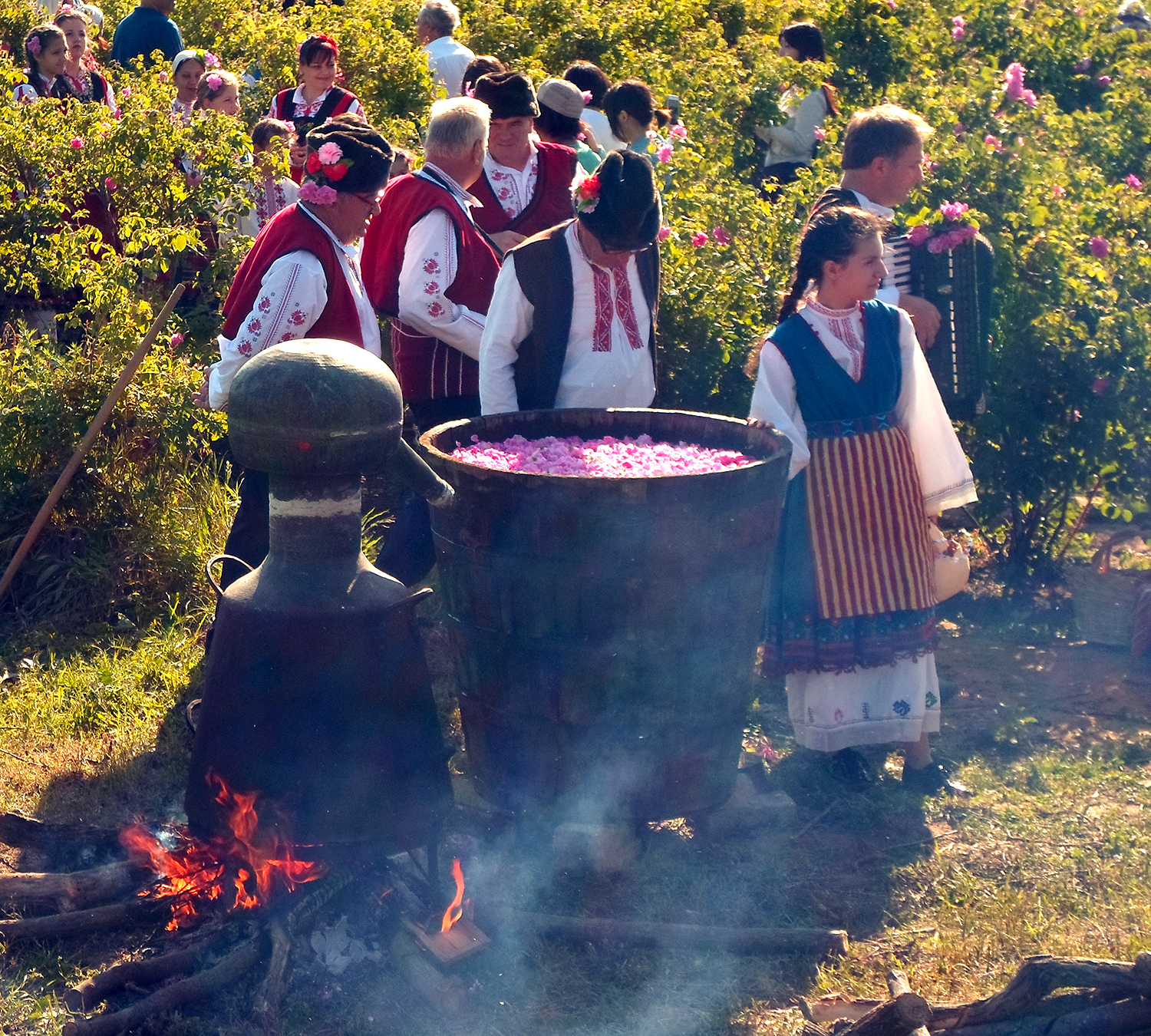 Дестилация на розово масло непосредствено до насаждения от маслодайни роди в с. Розово.